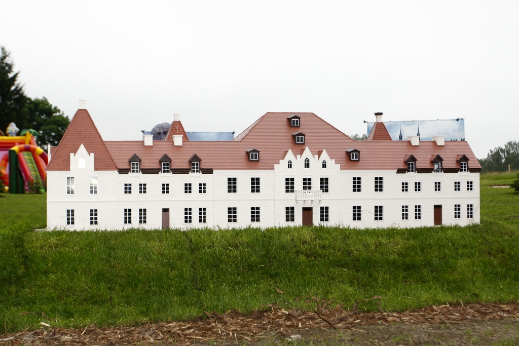 Park Zabytków Warmii i mazur. Pałac w Sztynorcie. Skala 1:25